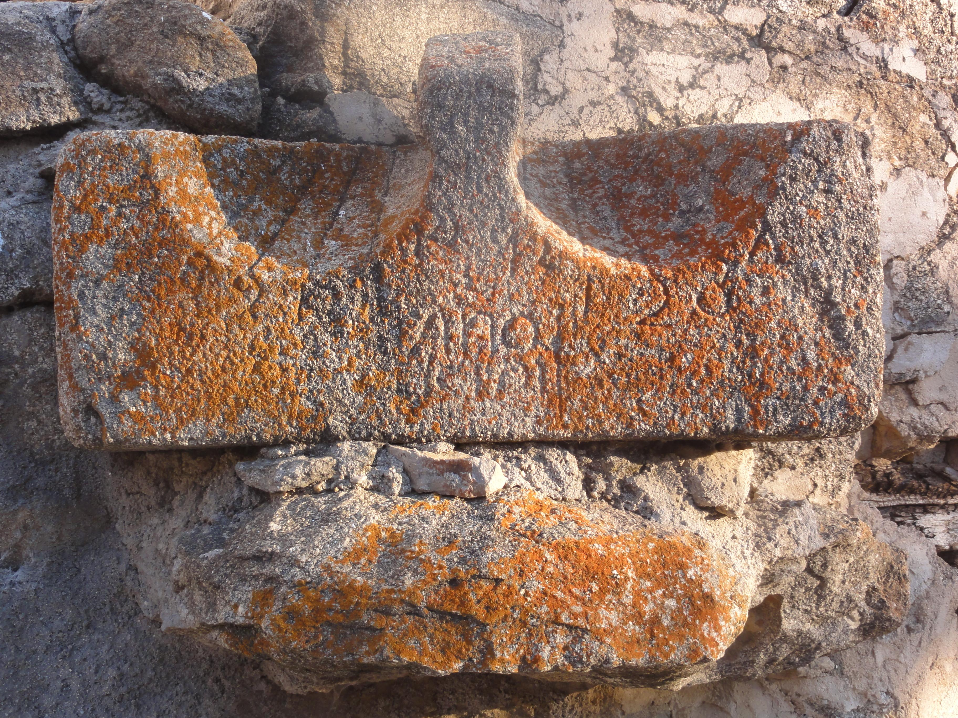 Reloj de Sol situado en la calle Regaderilla de San Miguel de Corneja, Ávila, España